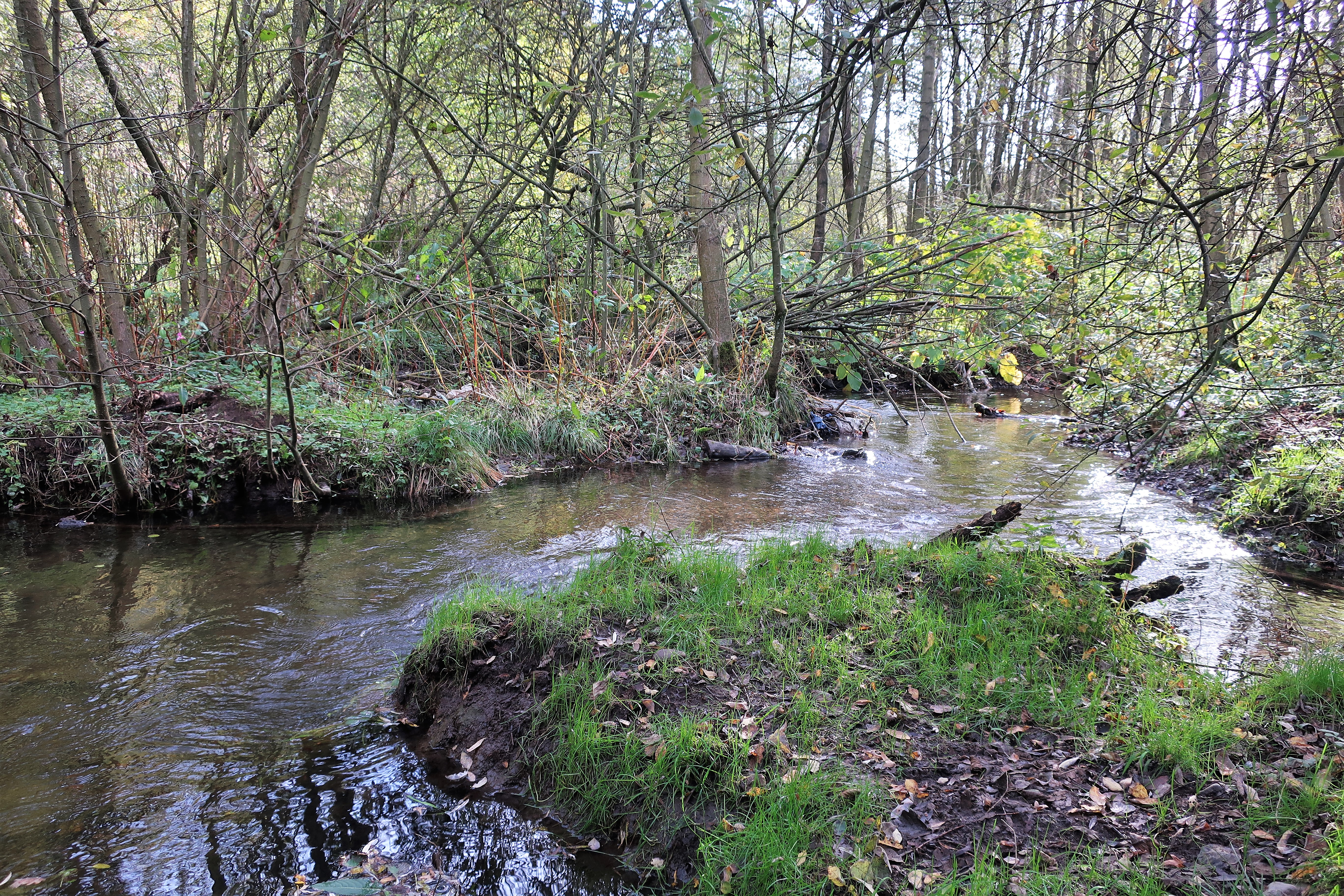 Nahmerbach auf der renaturierten Fläche des ehemaligen Koenigsees in Hagen-Hohenlimburg, Obernahmer.